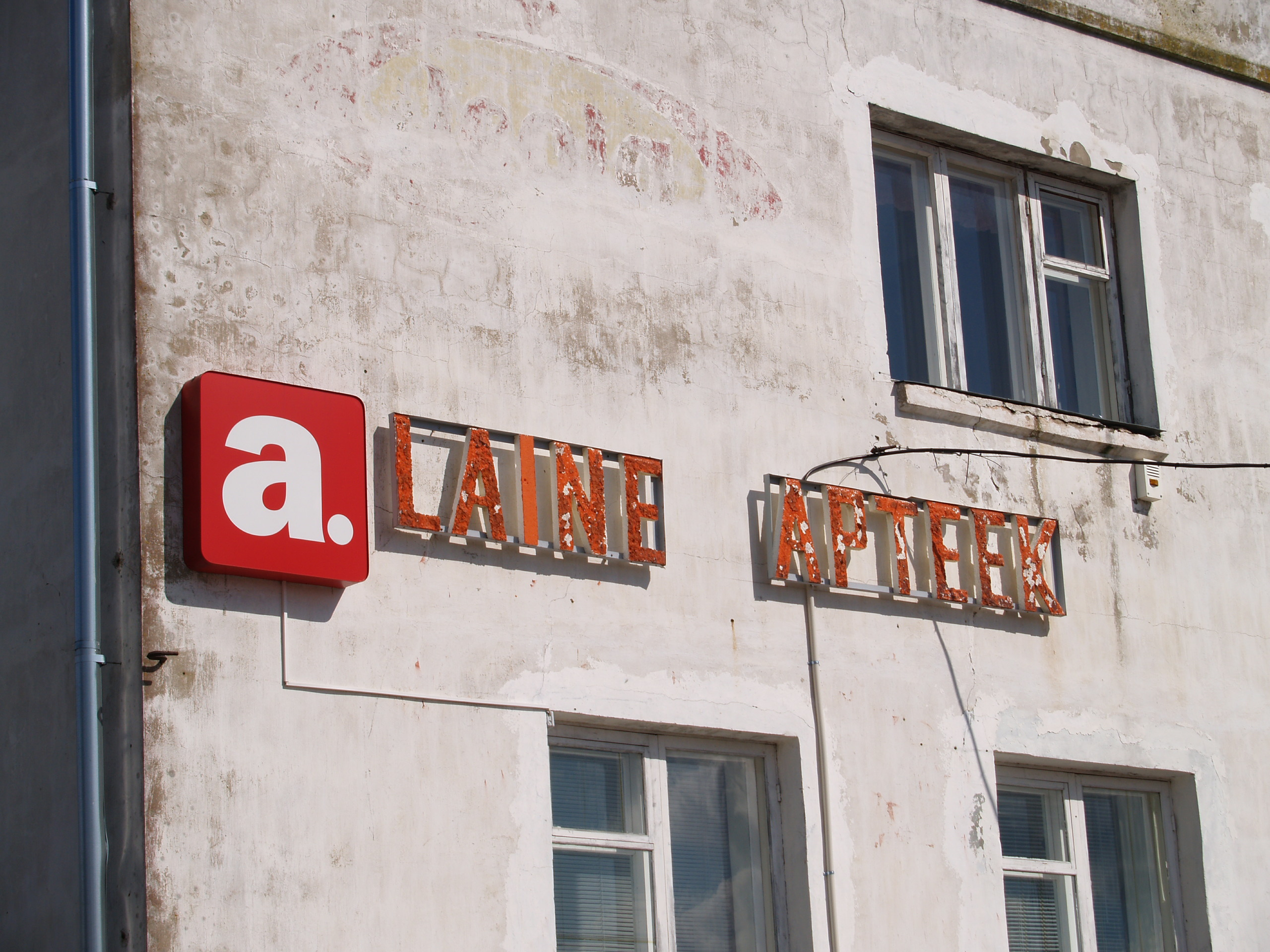 Suure-Jaani apteek